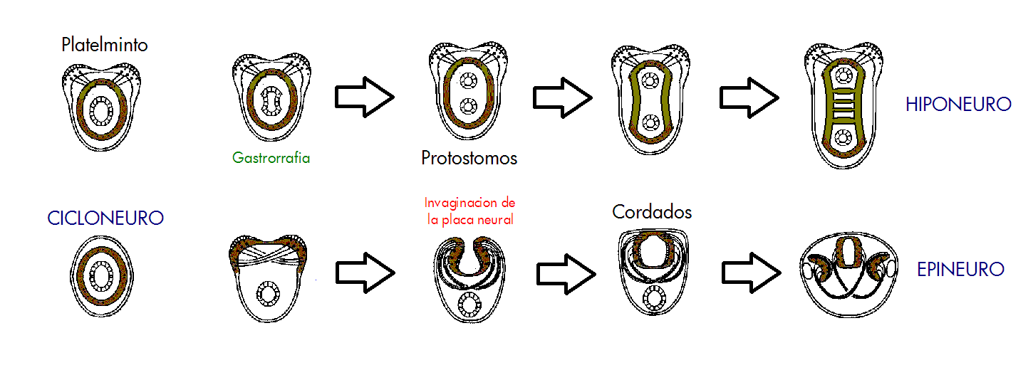 Disposición del sistema nervioso central mediante anatomía comparada en corte transversal que muestra el sistema nervioso y digestivo de los cicloneuros, hiponeuros y epineuros.